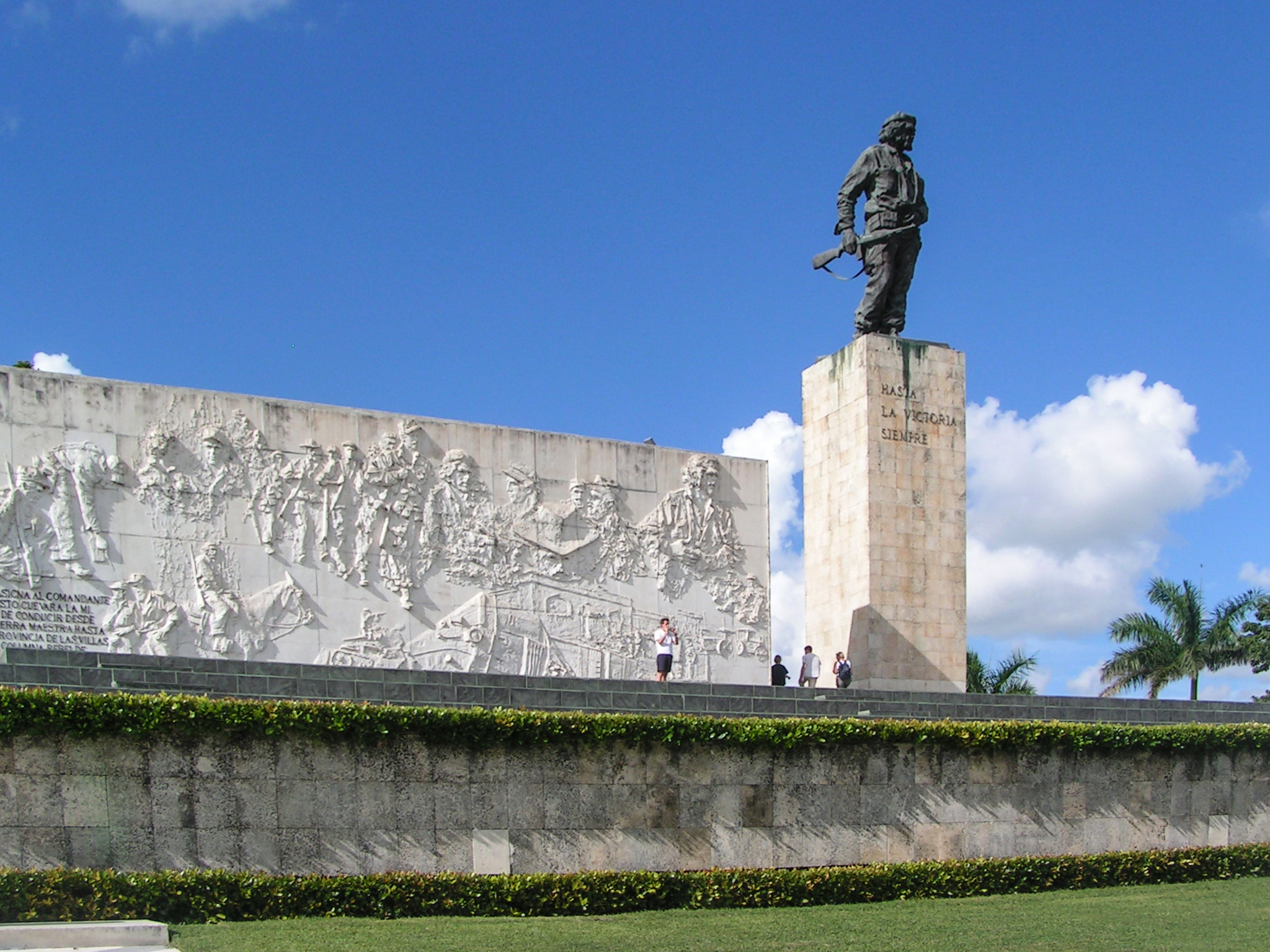 Che Guevara - Grab in Santa Clara, Cuba, 2004, aufgenommen mit Minolta Dimage Z1